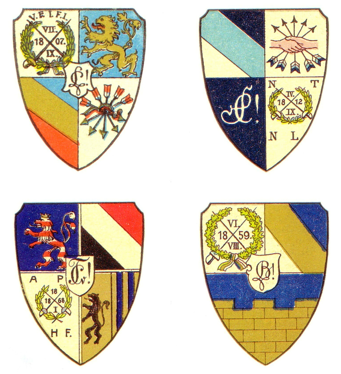 Wappen der Leipziger Corps Lusatia, Saxonia, Thuringia und Budissa beim 500-jährigen Jubiläum der Universität Leipzig